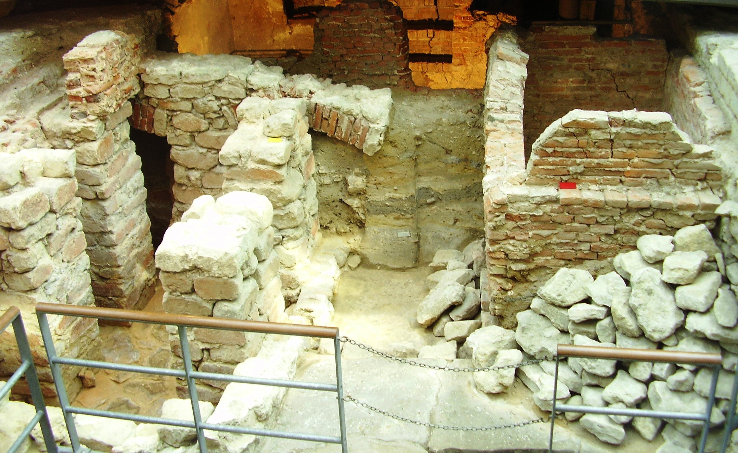 Description: Musée de site Bruxella 1238, Couvent des Récollets (Bruxelles) Author: User:Ben2 Date of creation: 08 juin 2006 Source: Photo personnelle